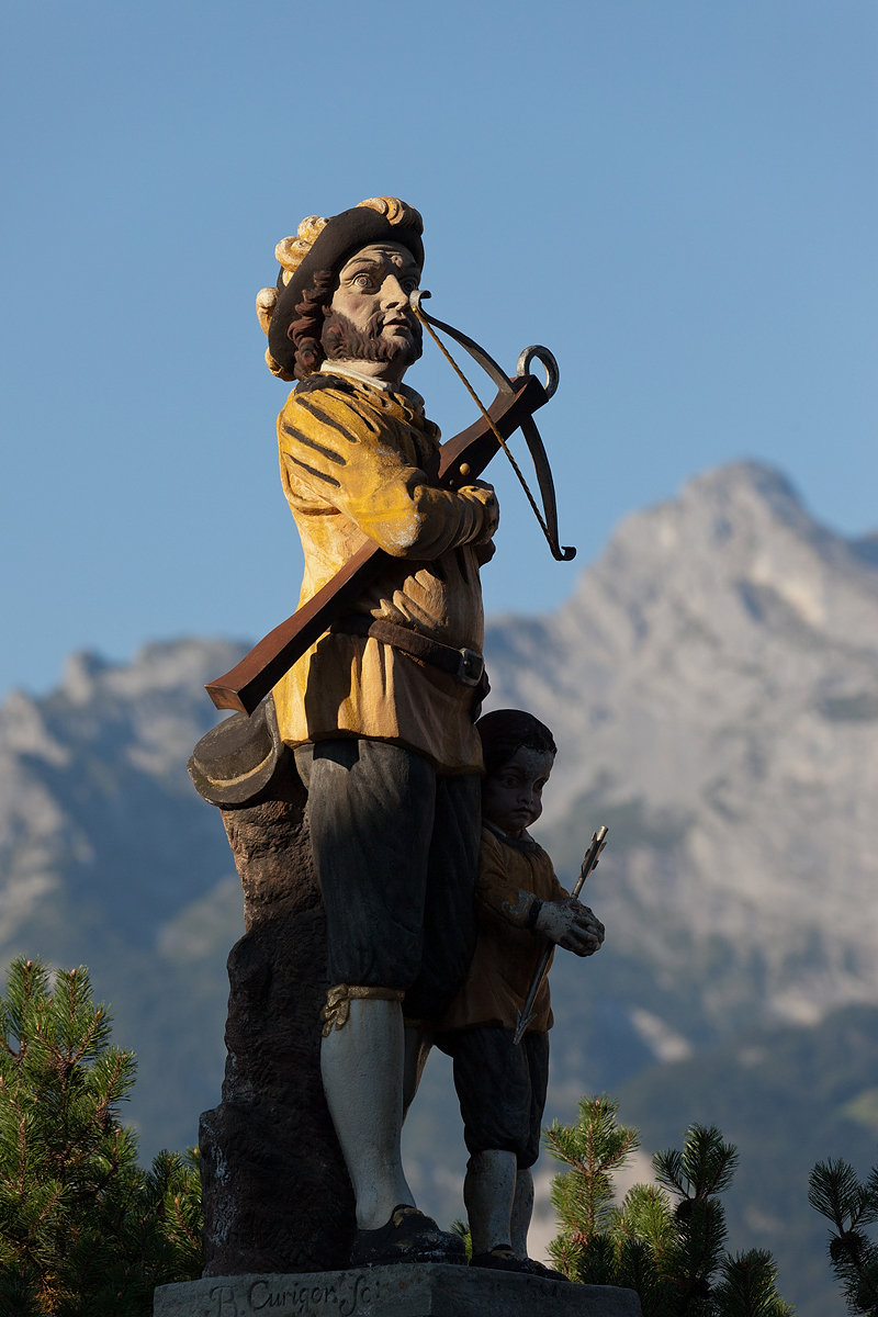 Tell-Denkmal in Bürglen (UR), Standbild von Josef Benedikt Curiger (1786), bis 1860 Brunnenfigur in Altdorf, 1891 den Bürglern von den Altdorfern geschenkt.